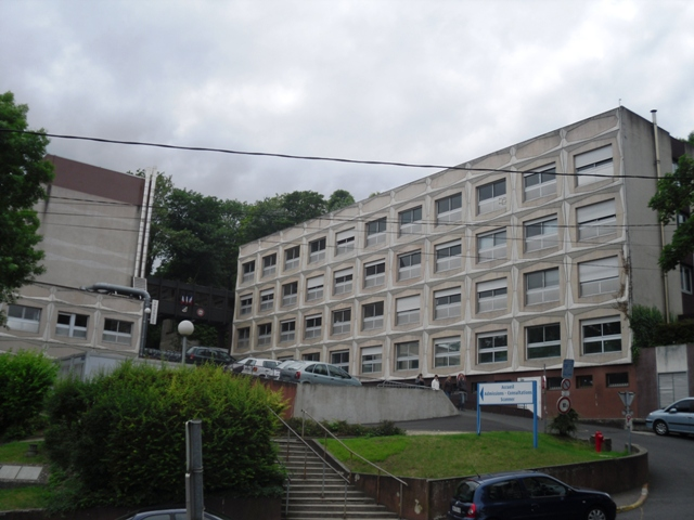 Le centre hospitalier de Juvisy-sur-Orge (91)